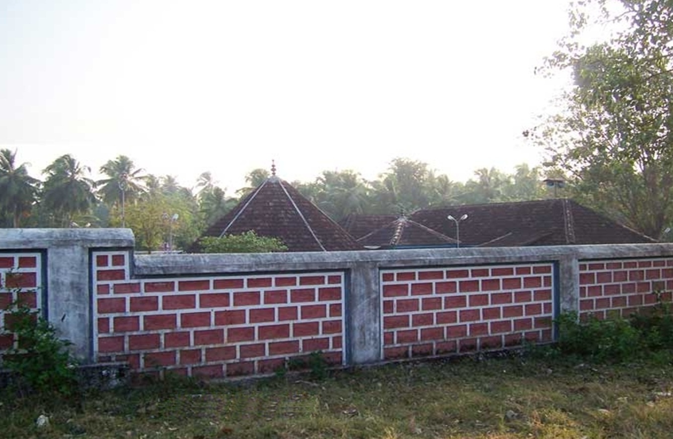 അഷ്ടമംഗലം മഹാദേവക്ഷേത്രം